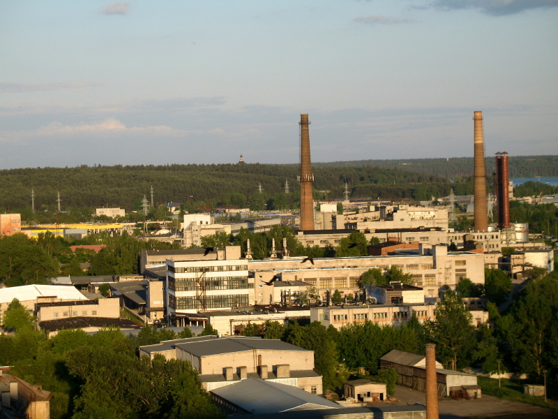 Pramonės įmonės Petrašiūnuose, Kaunas.